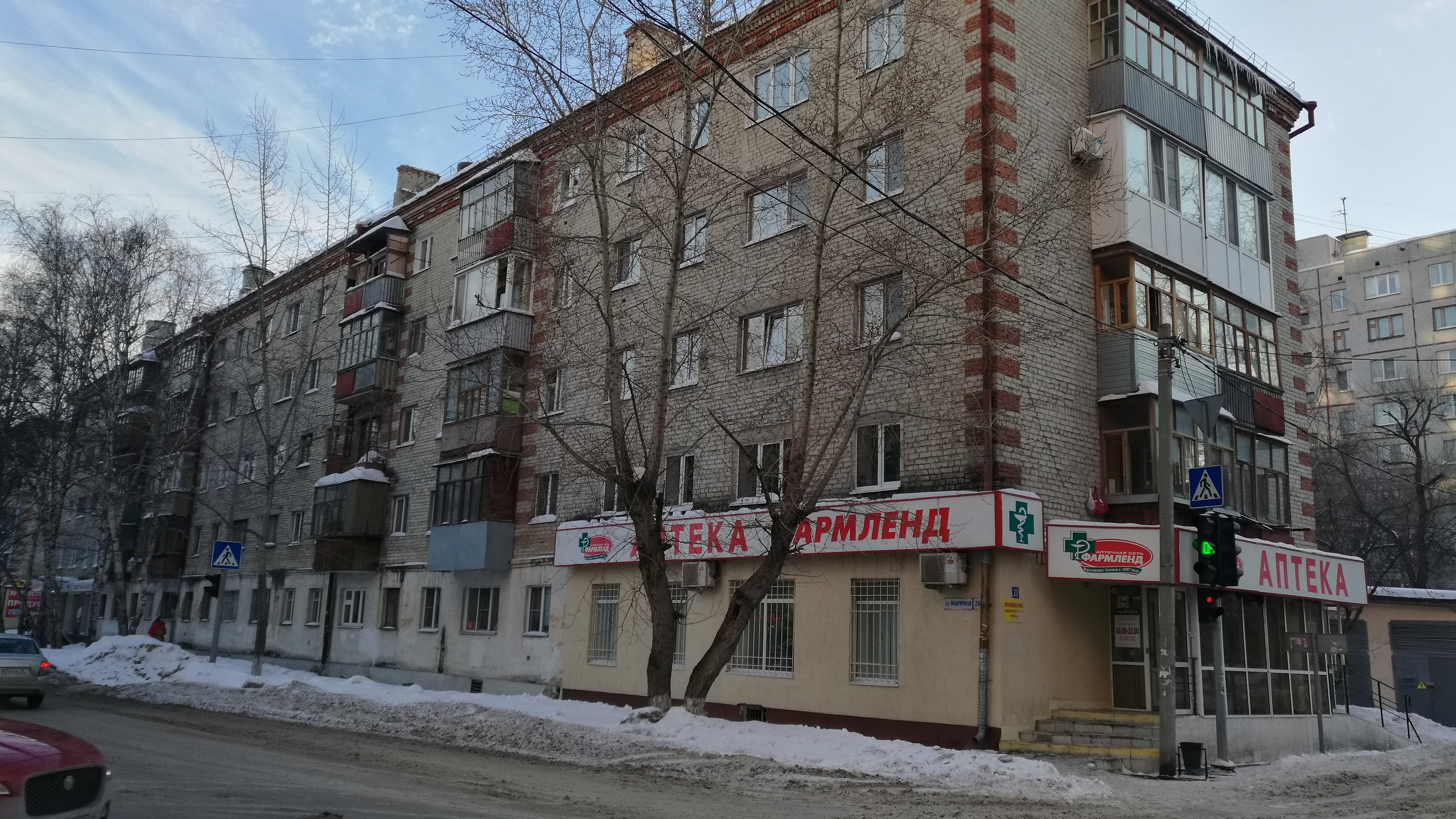 Loĝdomo en strato Fabriĉnaja, 20. Tjumeno, Rusio.